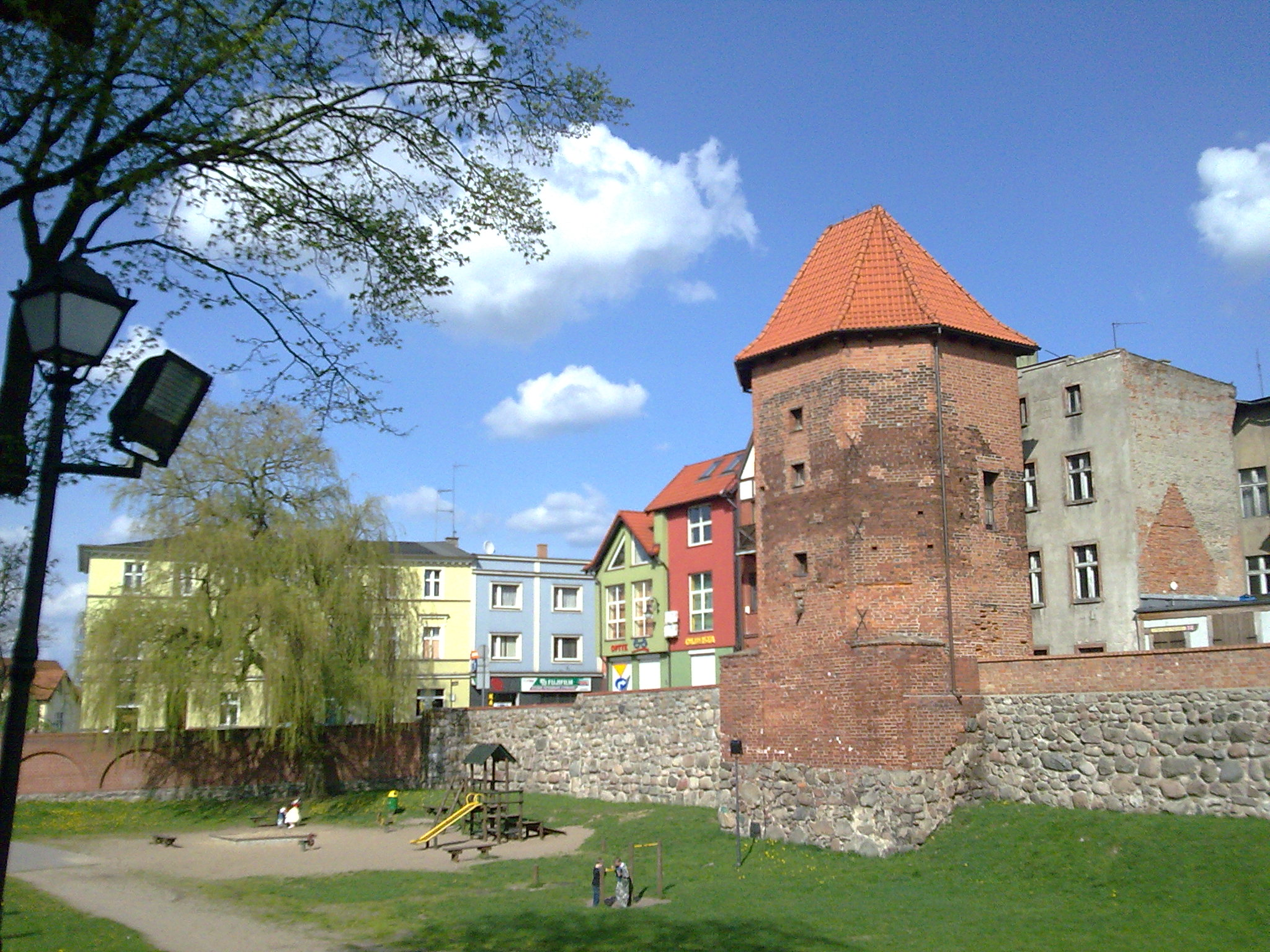 Chojnice - mury obronne z basztami, 2 poł. XIV